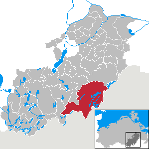 Feldberger Seenlandschaft in Mecklenburg-Vorpommern, Landkreis Mecklenburg-Strelitz